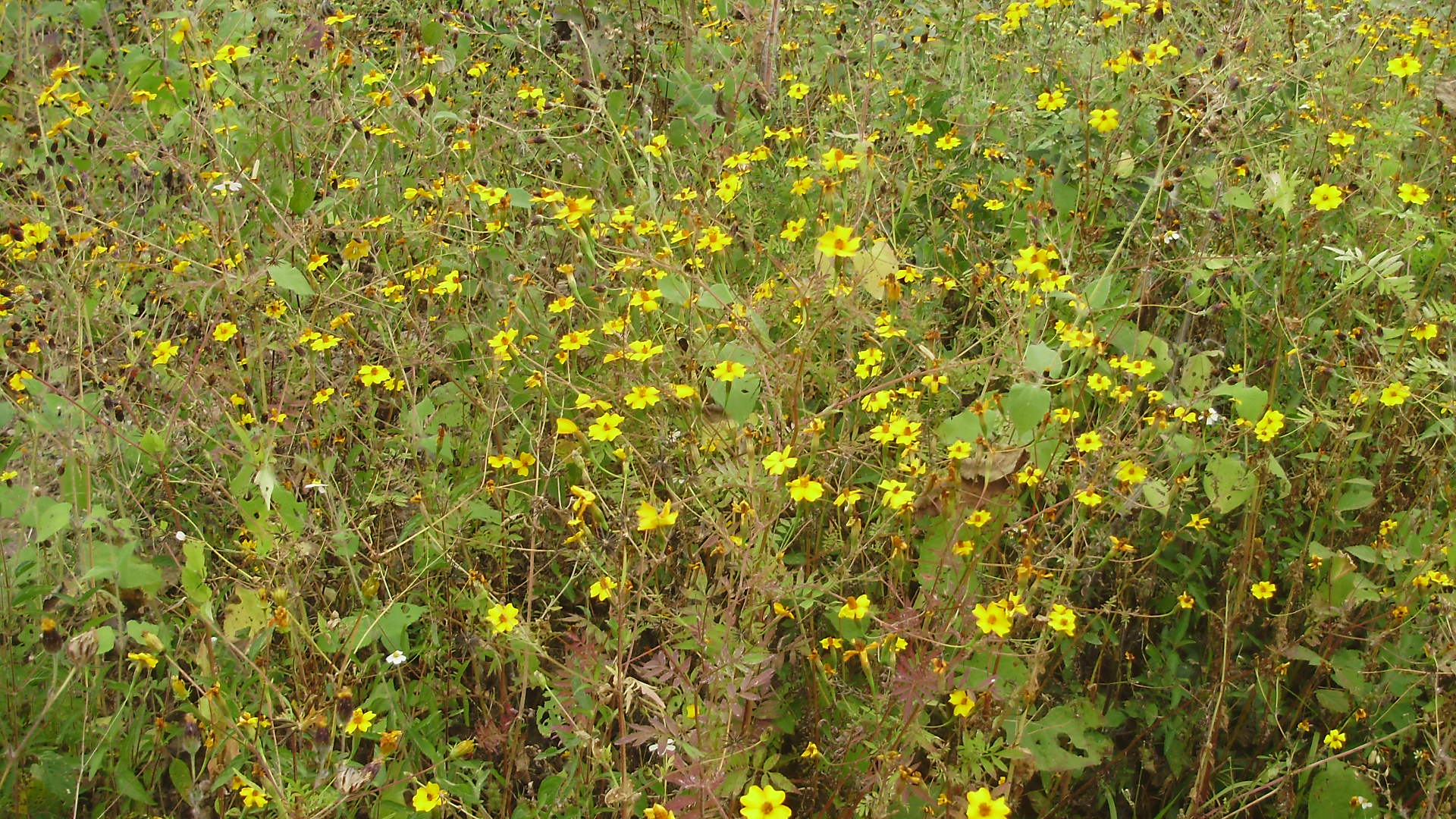 Parche de Tagates lunulata